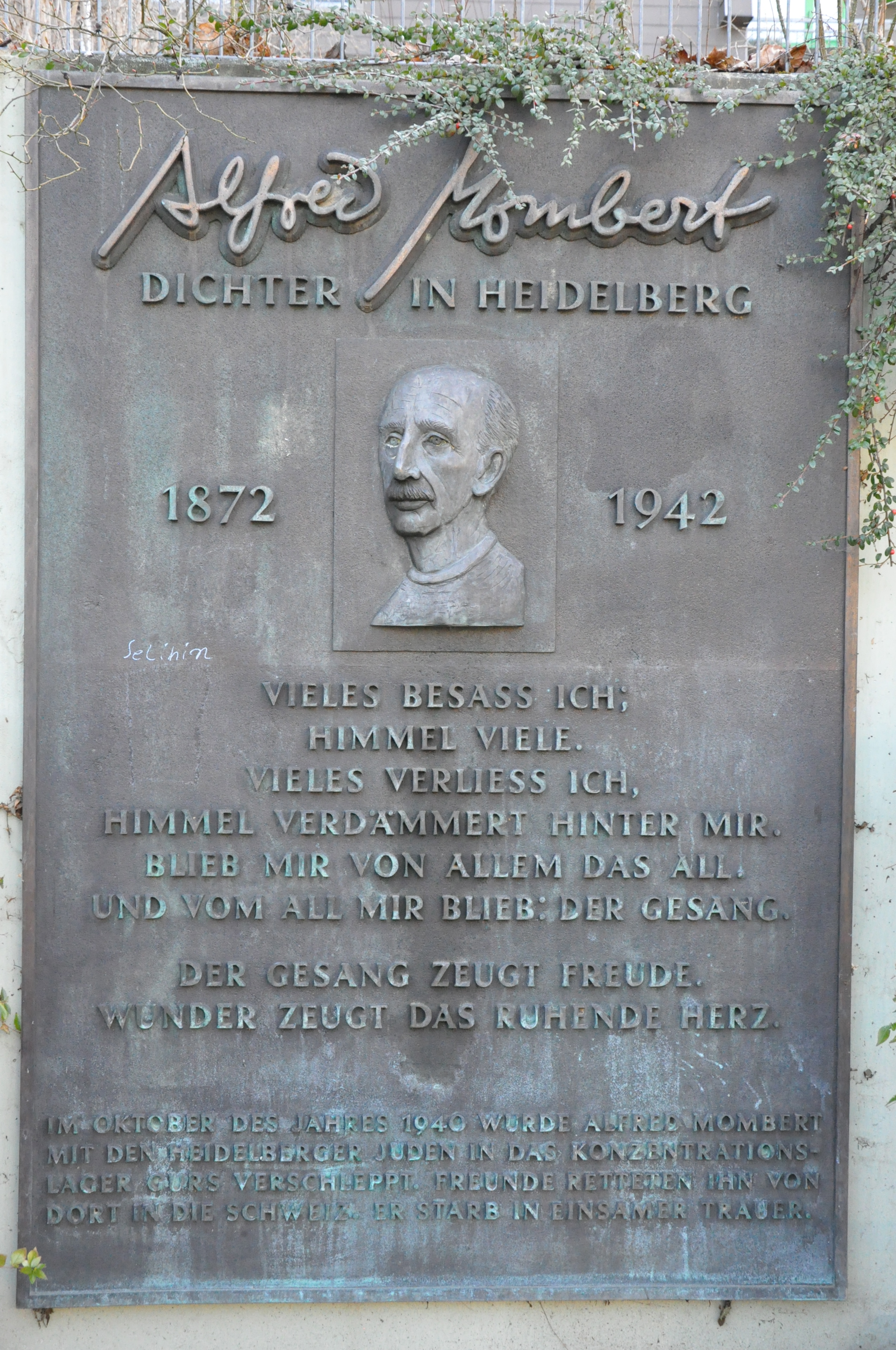 Gedenktafel für Alfred Mombert im Mombertplatz Heidelberg (angebracht beim Bau in den 1970er Jahren)